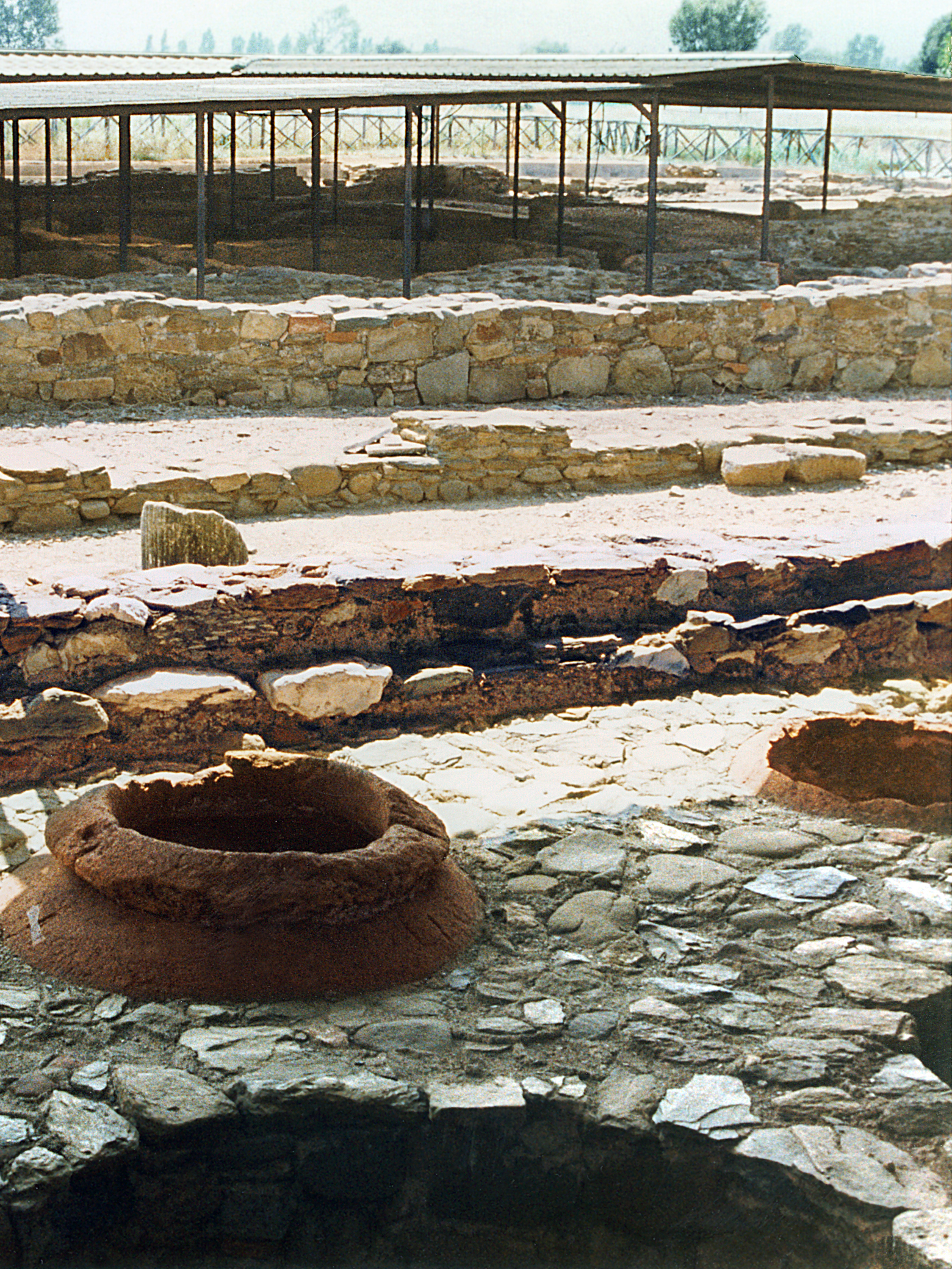 Luna, Forum: Geschäftsräume. Provinz La Spezia, Italien.